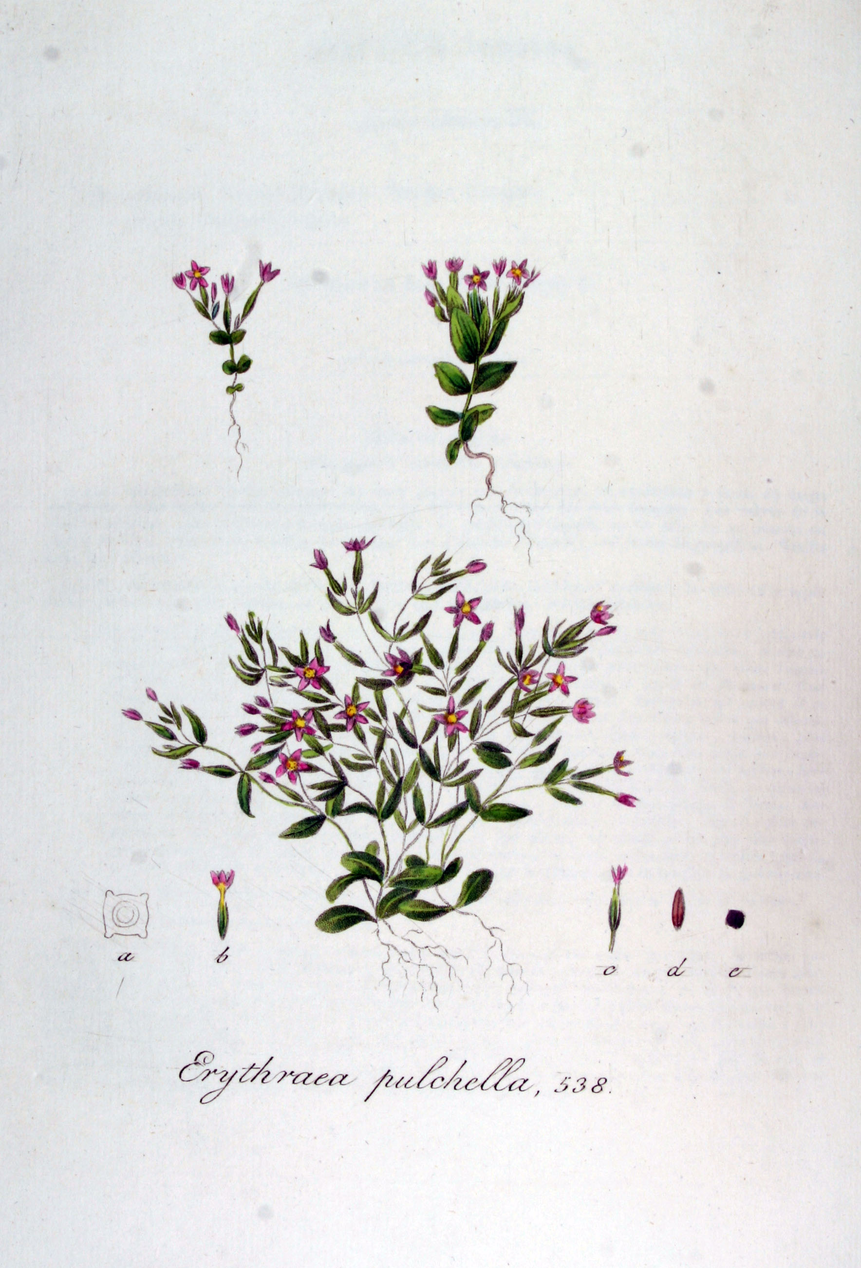 Centaurium pulchellum (Schwatz) Druce (Syn. Erythrea pulchella (Schwartz) Fries)